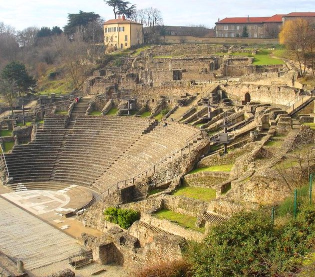 Théâtre antique de Fourvière. d'apres wiki allemande. domaine public